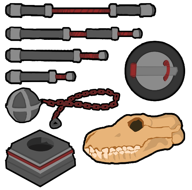 Tout le matériel pour jouer au Jugger